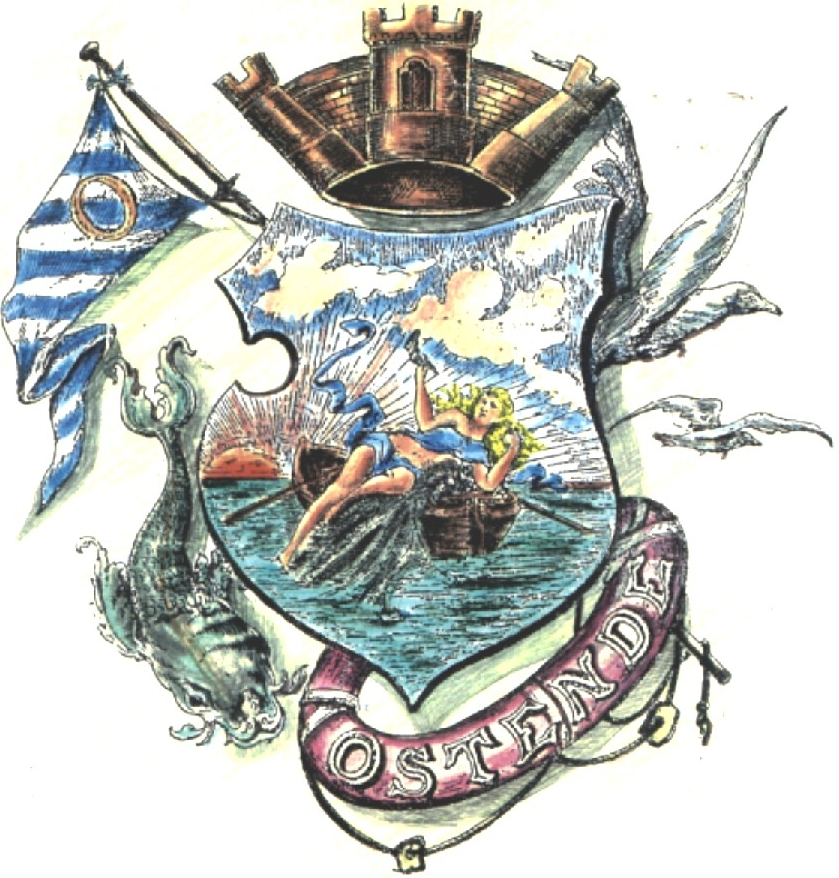 Partido de Pinamar, Provincia de Buenos Aires, Argentino